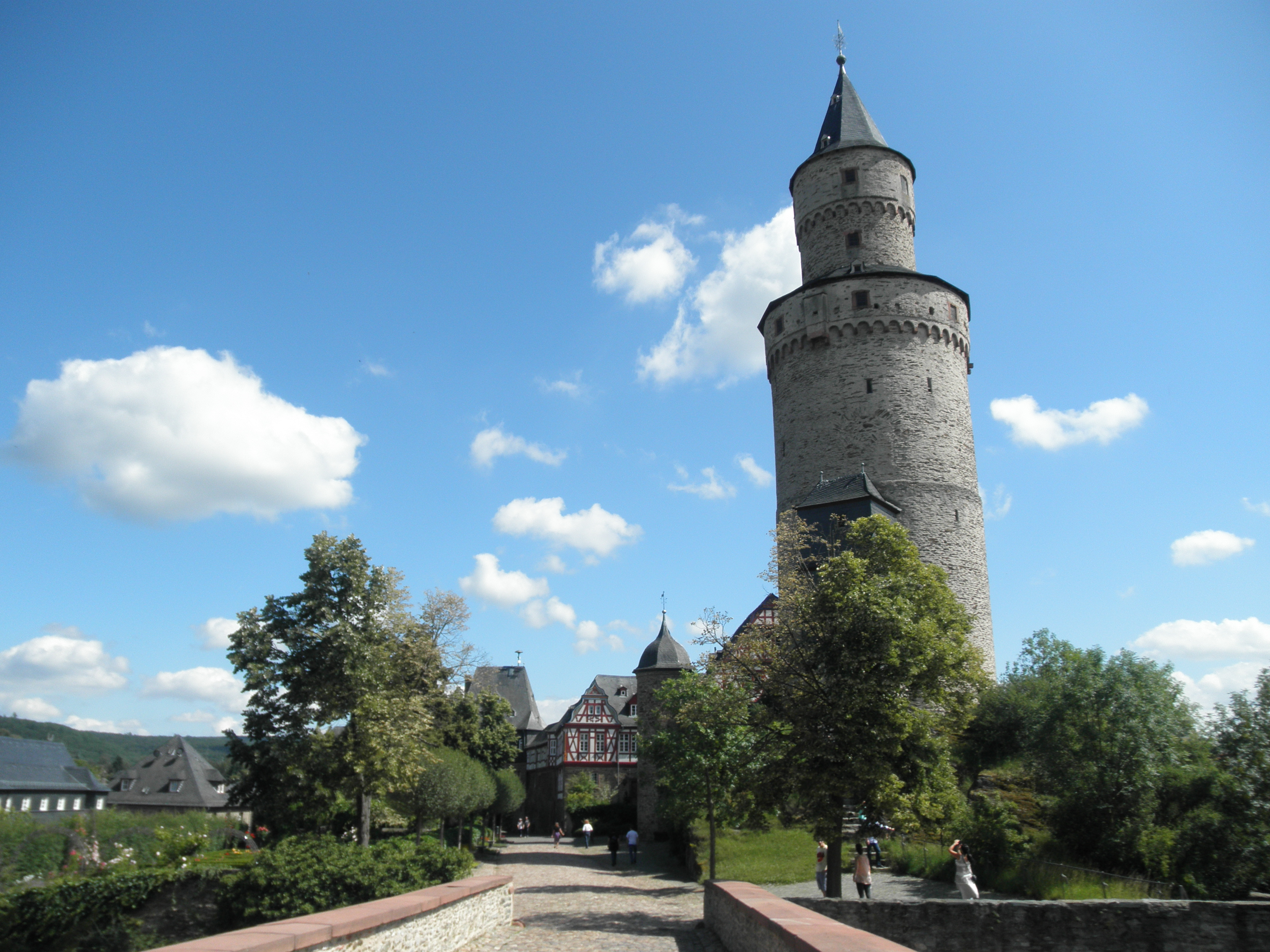 "Hexenturm" Idstein